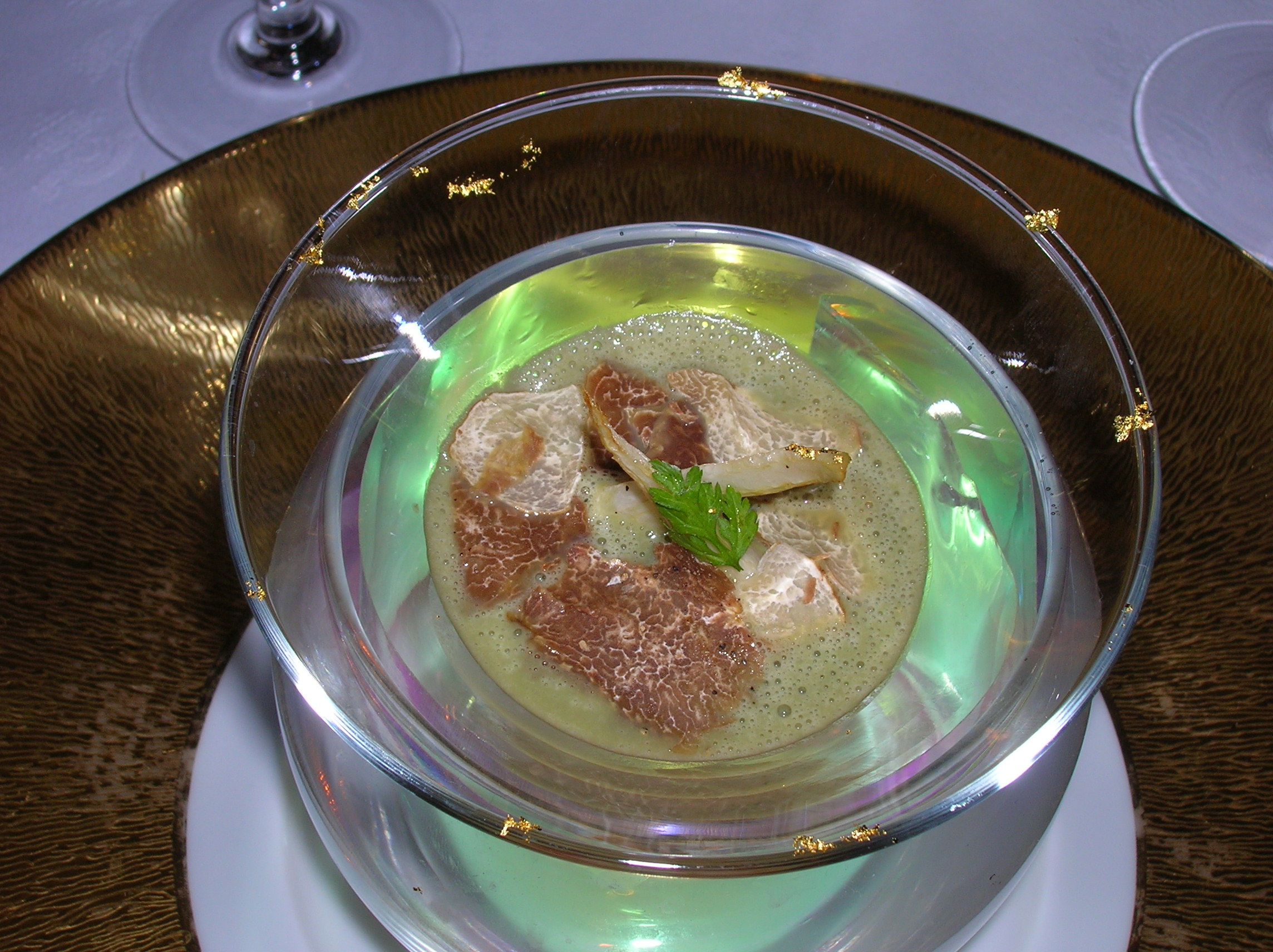 Robuchon a Galera Macau